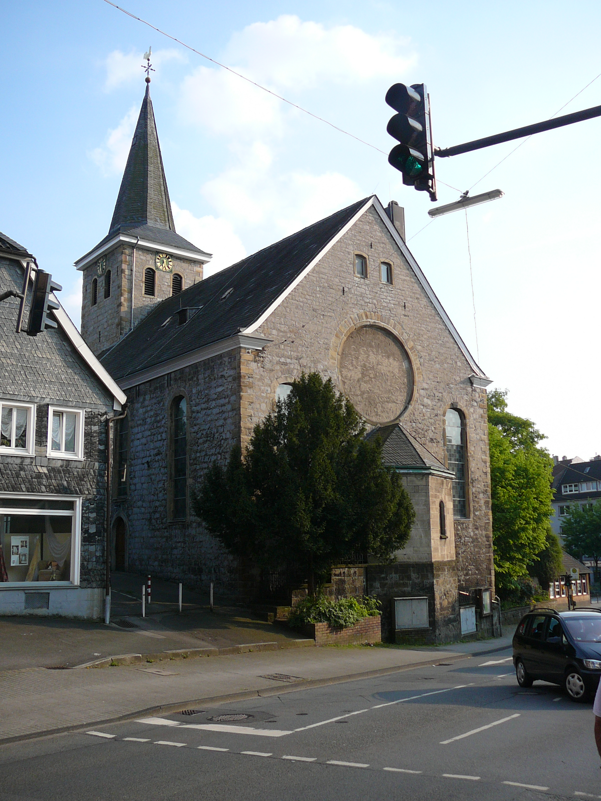 Schwelmer Straße, Wuppertal